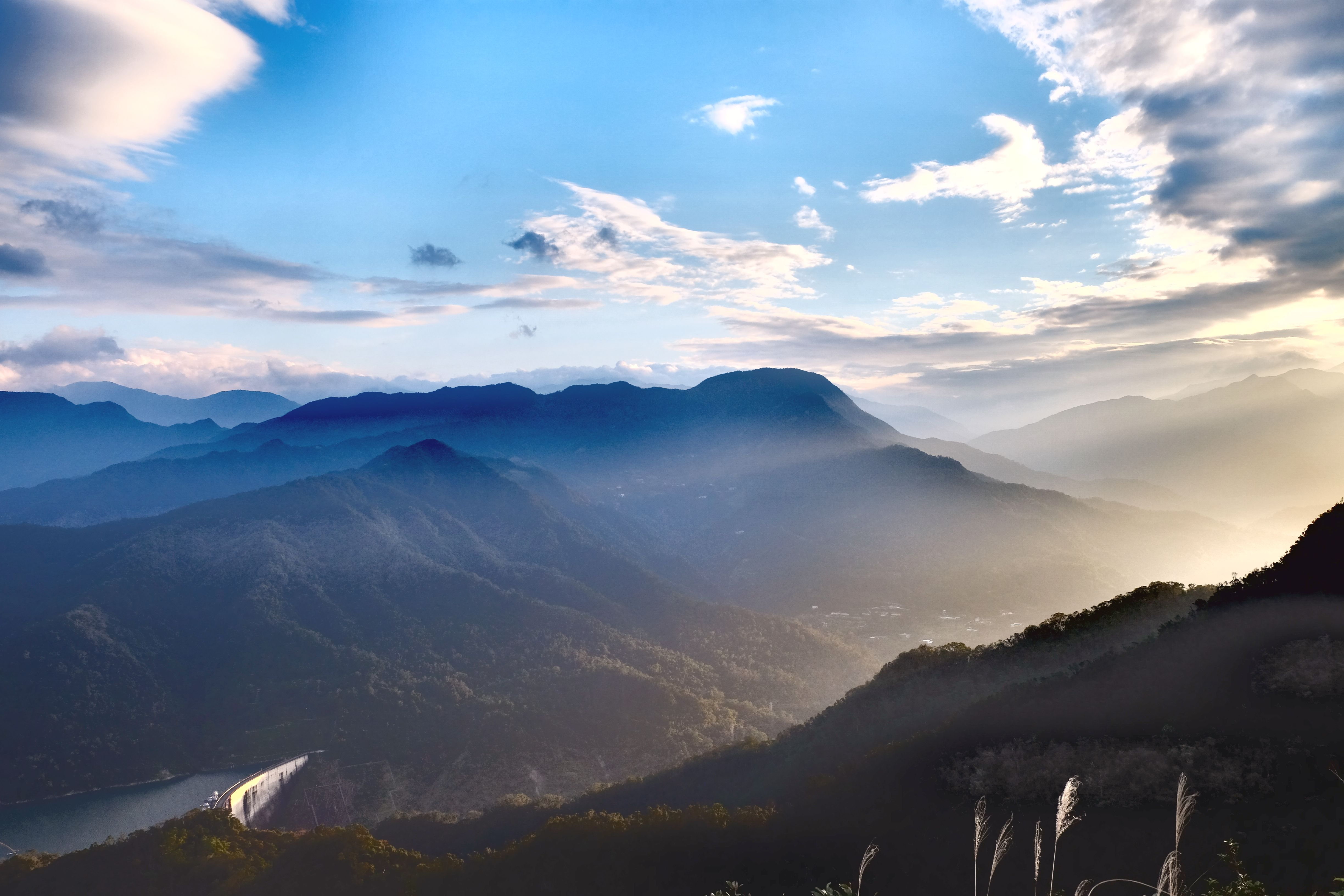 2018Feitsui Dam